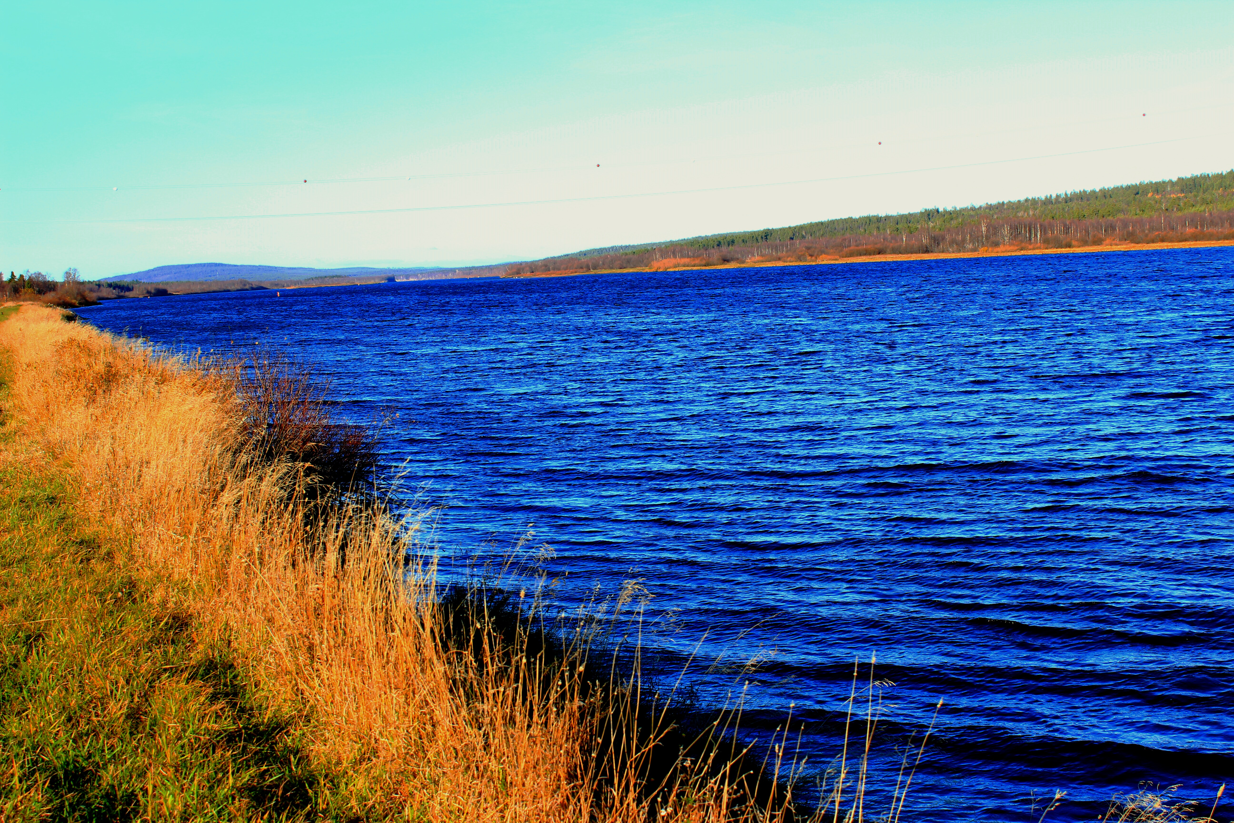 Ounasjoki Rovaniemellä Ylikylän kohdalla